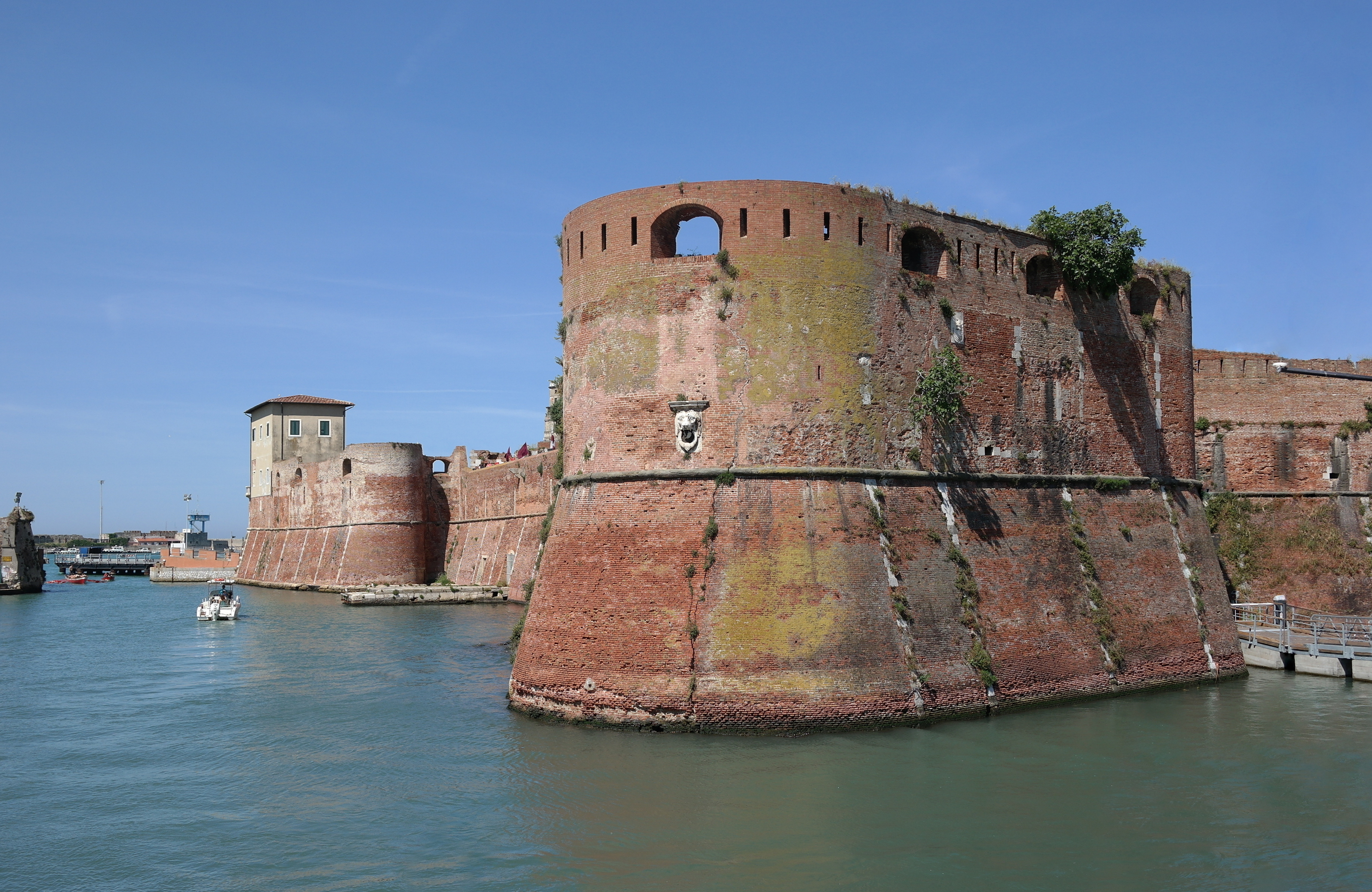 Bastione dell'Ampolletta, Fortezza vecchia , Livorno